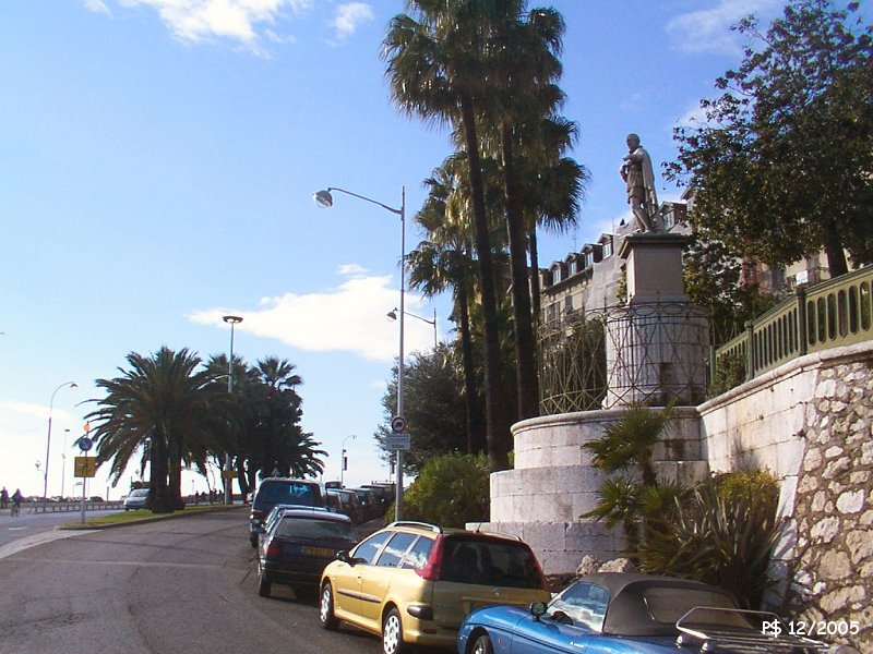 Le square Guynemer à droite. Prise de vue à partir du quai Lunel. Le monument aux morts est 50 mètres plus loin, après le virage.